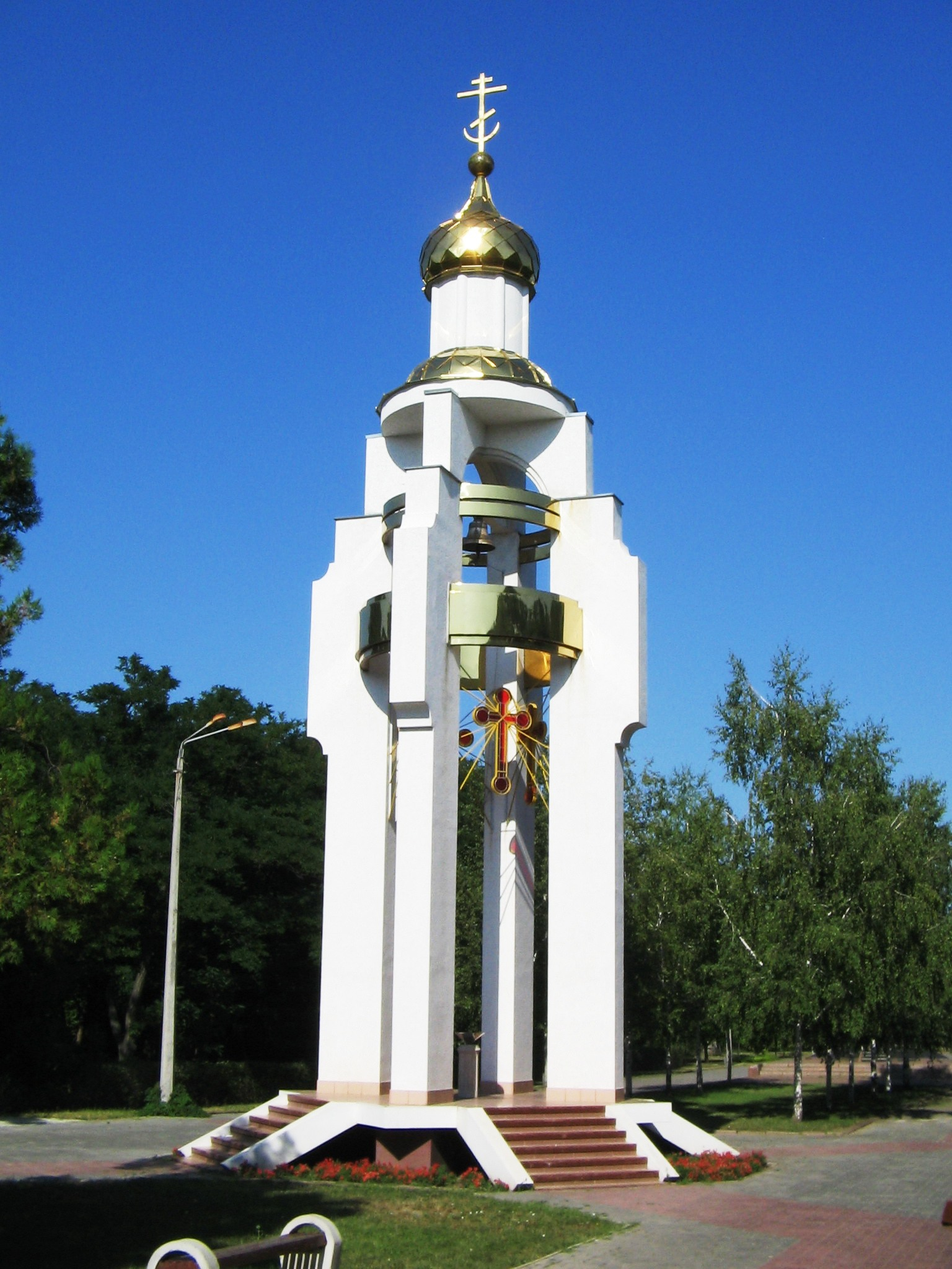 Часовня в парке Победы